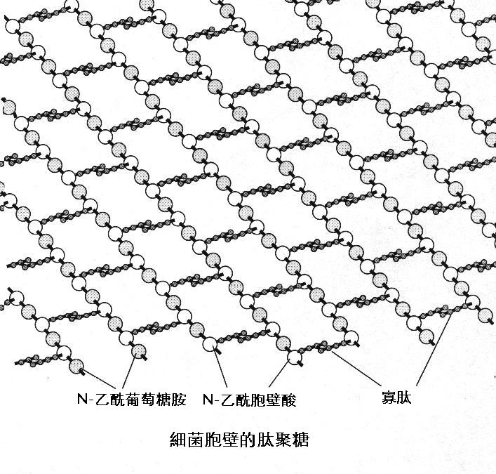 來自德文維基